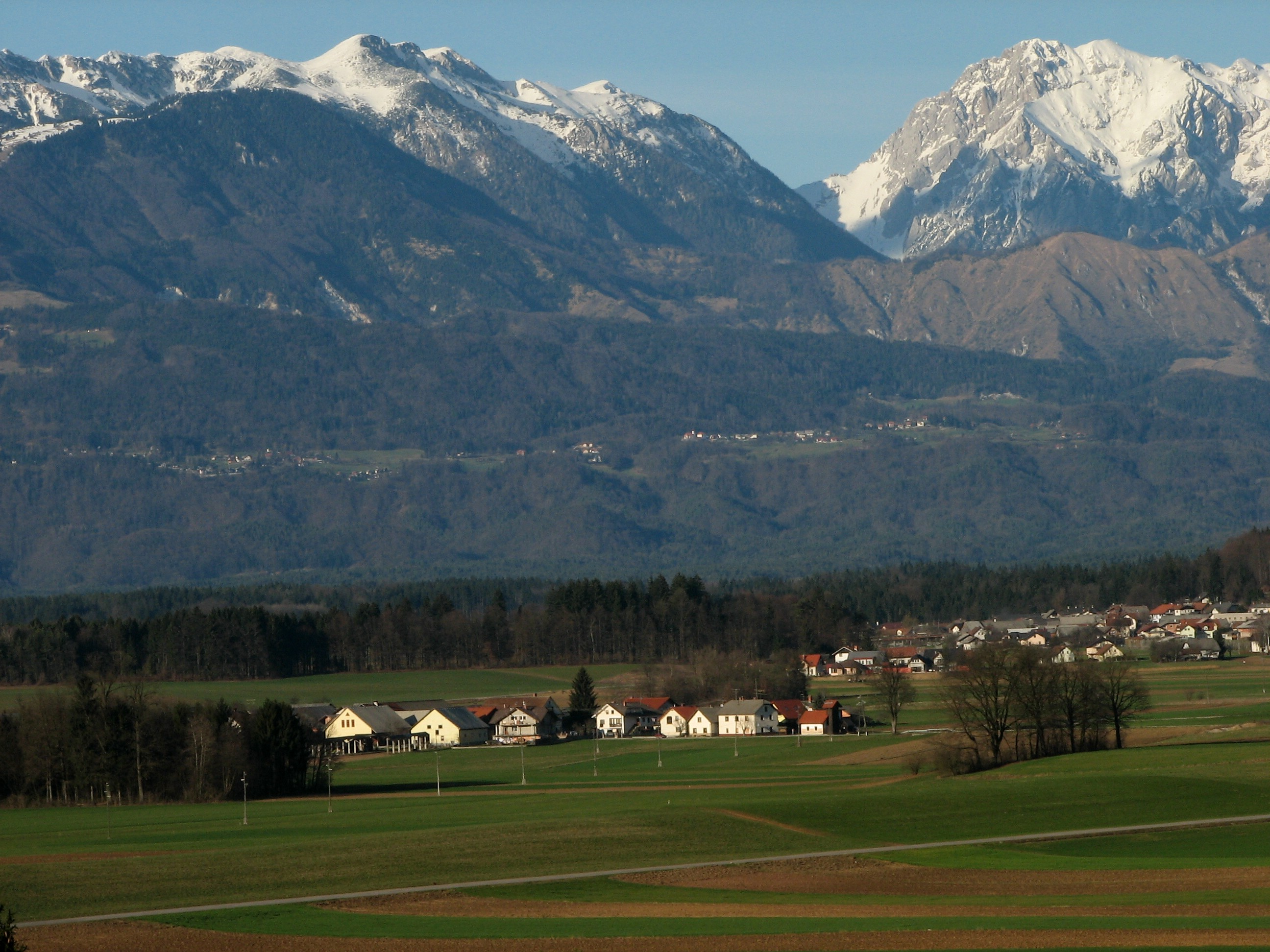 Polje pri Vodicah, Slovenia